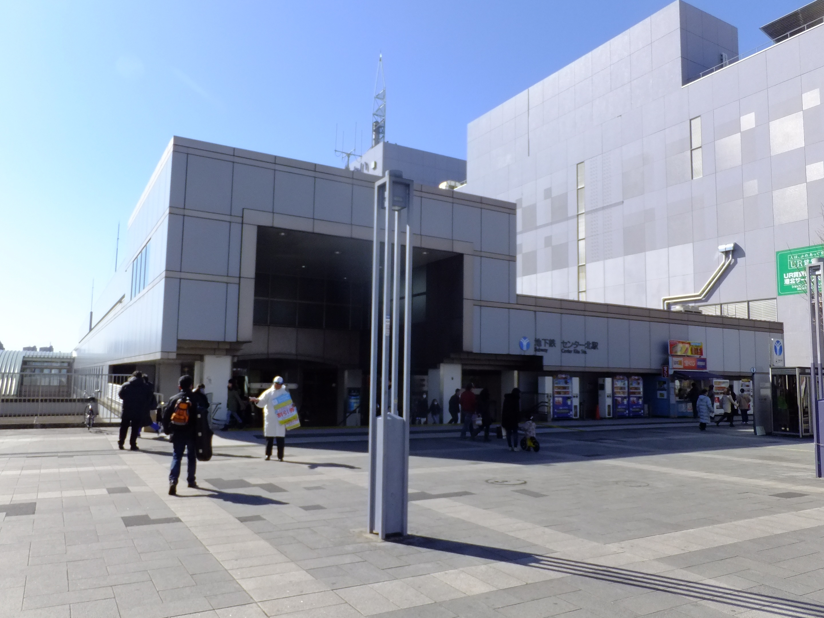 横浜市営地下鉄・センター北駅（横浜市都筑区）